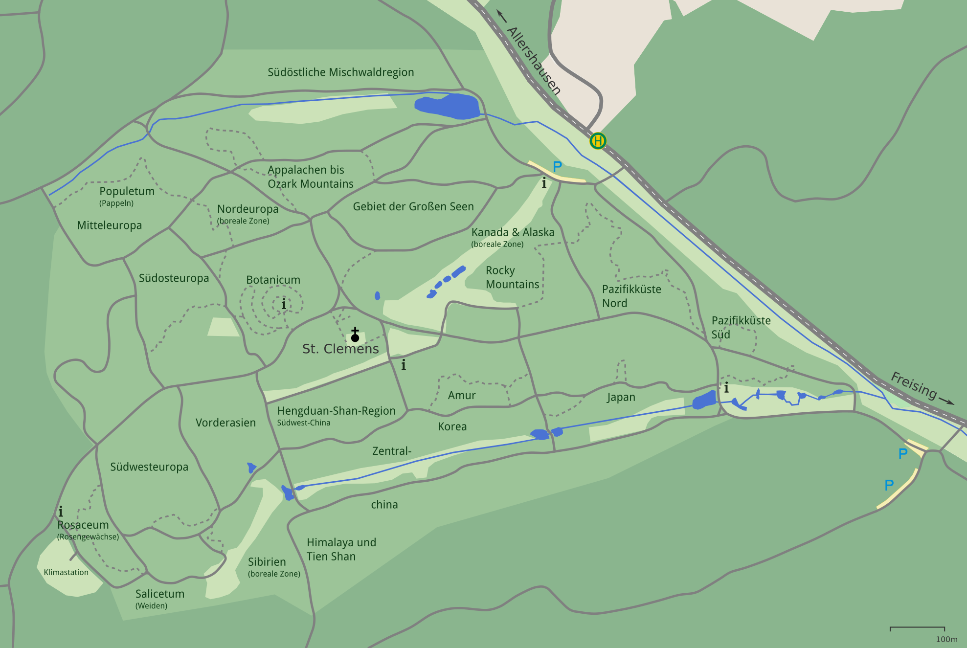 Karte des Weltwaldes im Kranzberger Forst bei Freising